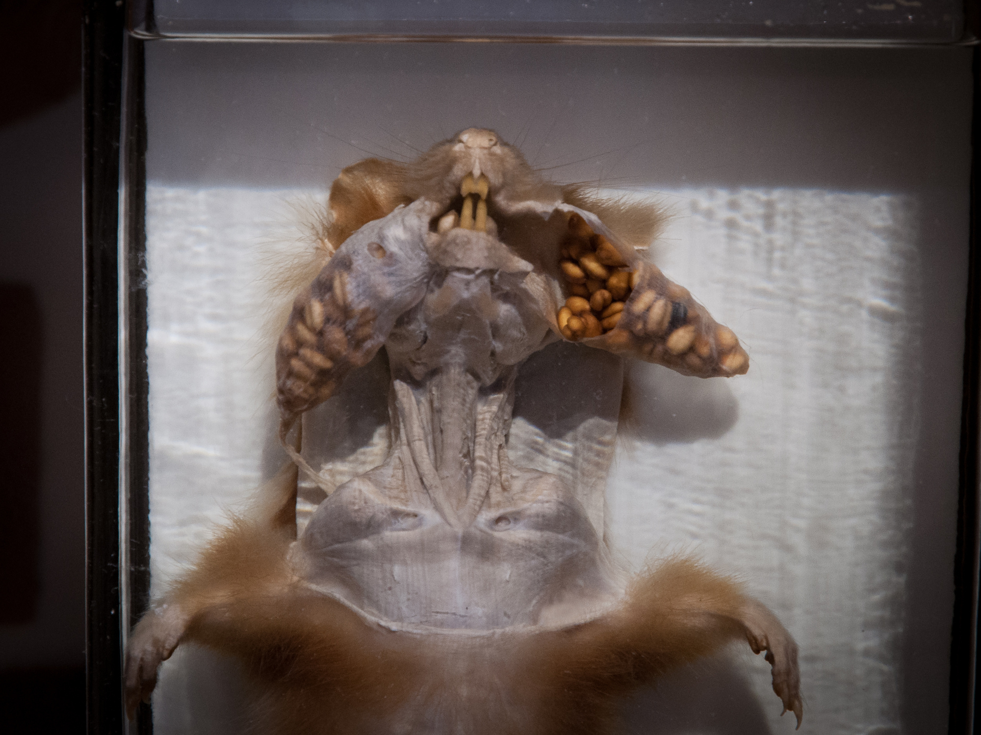 Herauspräparierte Backentaschen eines Feldhamsters. Exponat im Senckenberg Naturmuseum in Frankfurt am Main, Deutschland. Fotografiert durch die Gläser einer Abtrennscheibe, einer Vitrinentür, des Aufbewahrungsbehälters und durch die Konservierungsflüssigkeit.